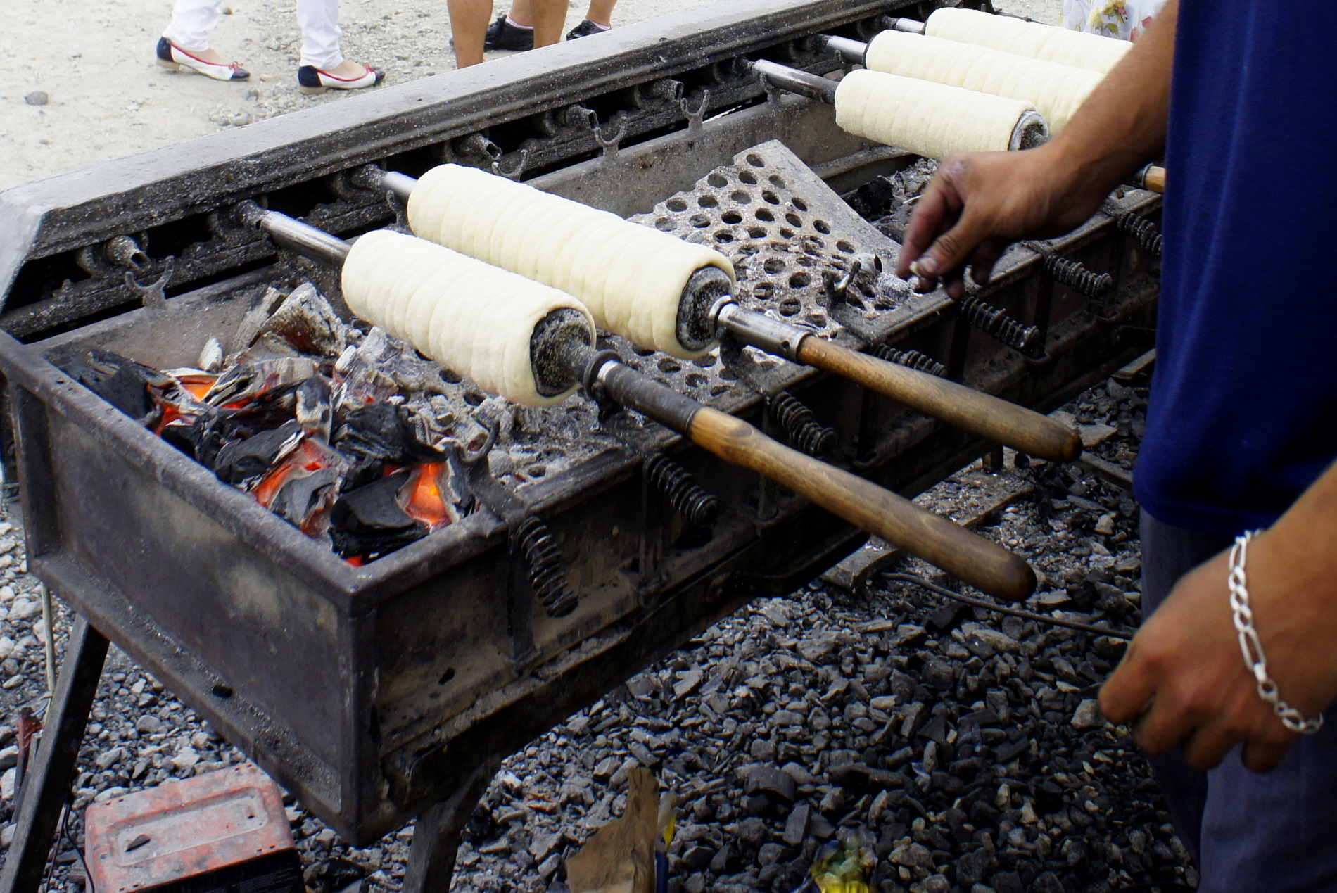 Kozunak ( cozonac, kürtőskalács, baumstritzel, trdelník, chimmey cake ) - ciasto drożdżowe opiekane na grillu. ( Bukowina, Rumunia 2012 r.)